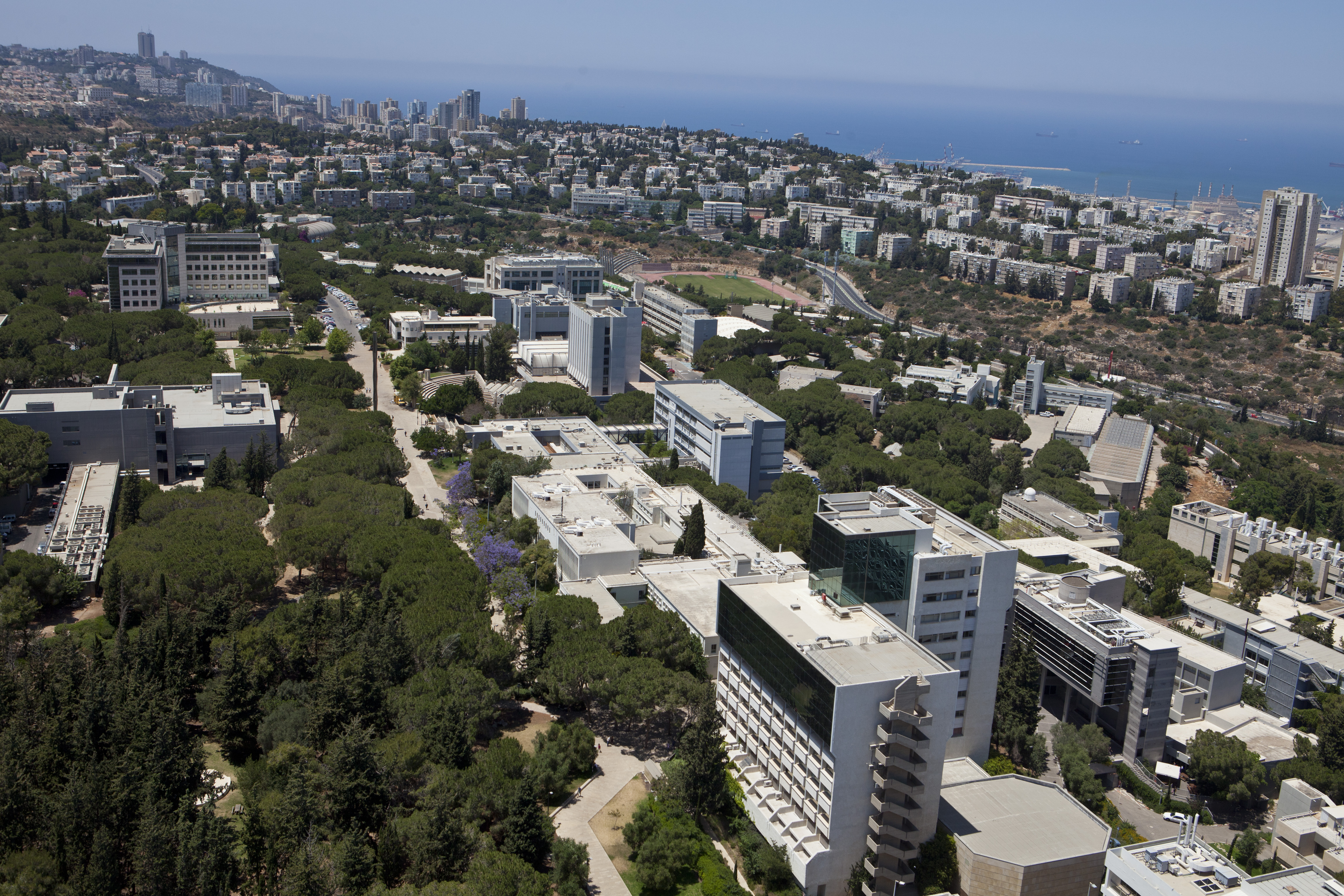 הטכניון